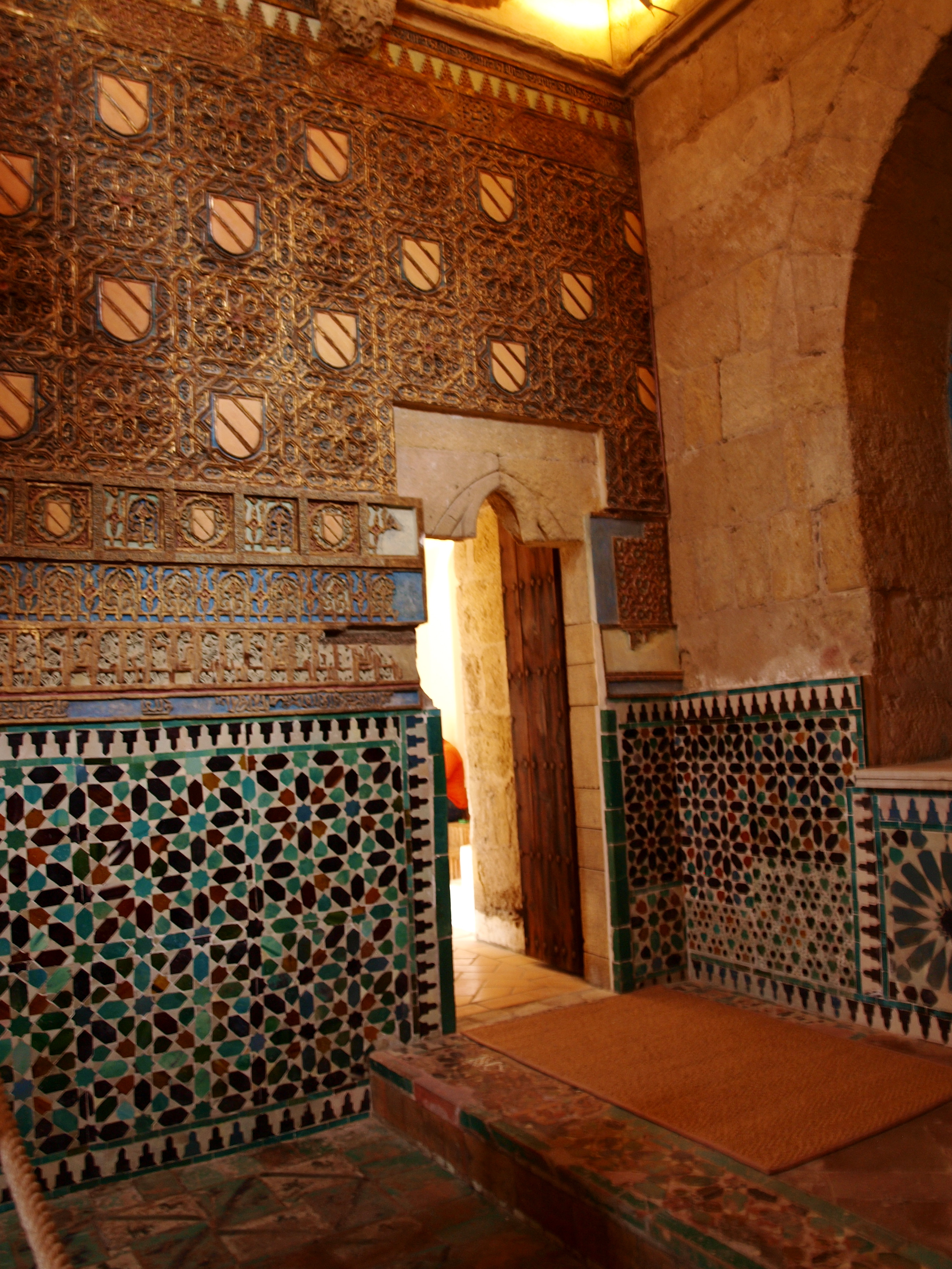 Capilla de San Bartolomé (Córdoba, España).